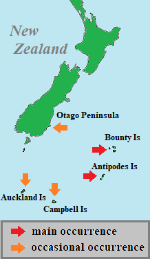 Výskyt tučňáka chocholatého v období hnízdění: červená šipka značí hlavní výskyt (resp. aktuální záznamy o chovu), oranžová šipka značí příležitostný nebo předpokládaný výskyt (dřívější záznamy o chovu)